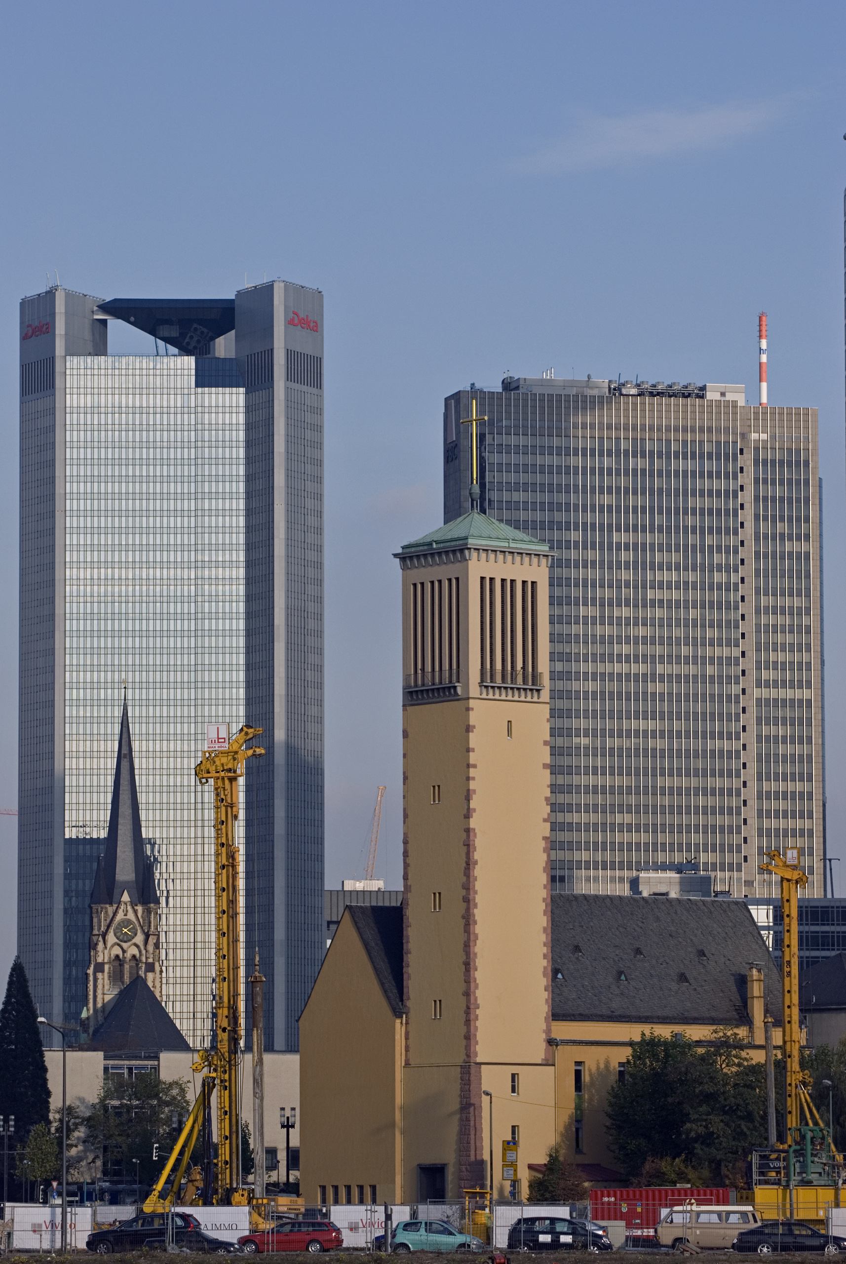 Matthäuskirche in Frankfurt am Main, Blick aus Richtung Osten von der Den Haager Straße, im Hintergrund das Trianon, das FBC und die Antoniaskirche